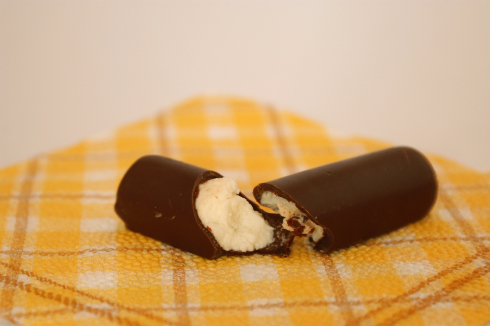 Túró Rudi undressed